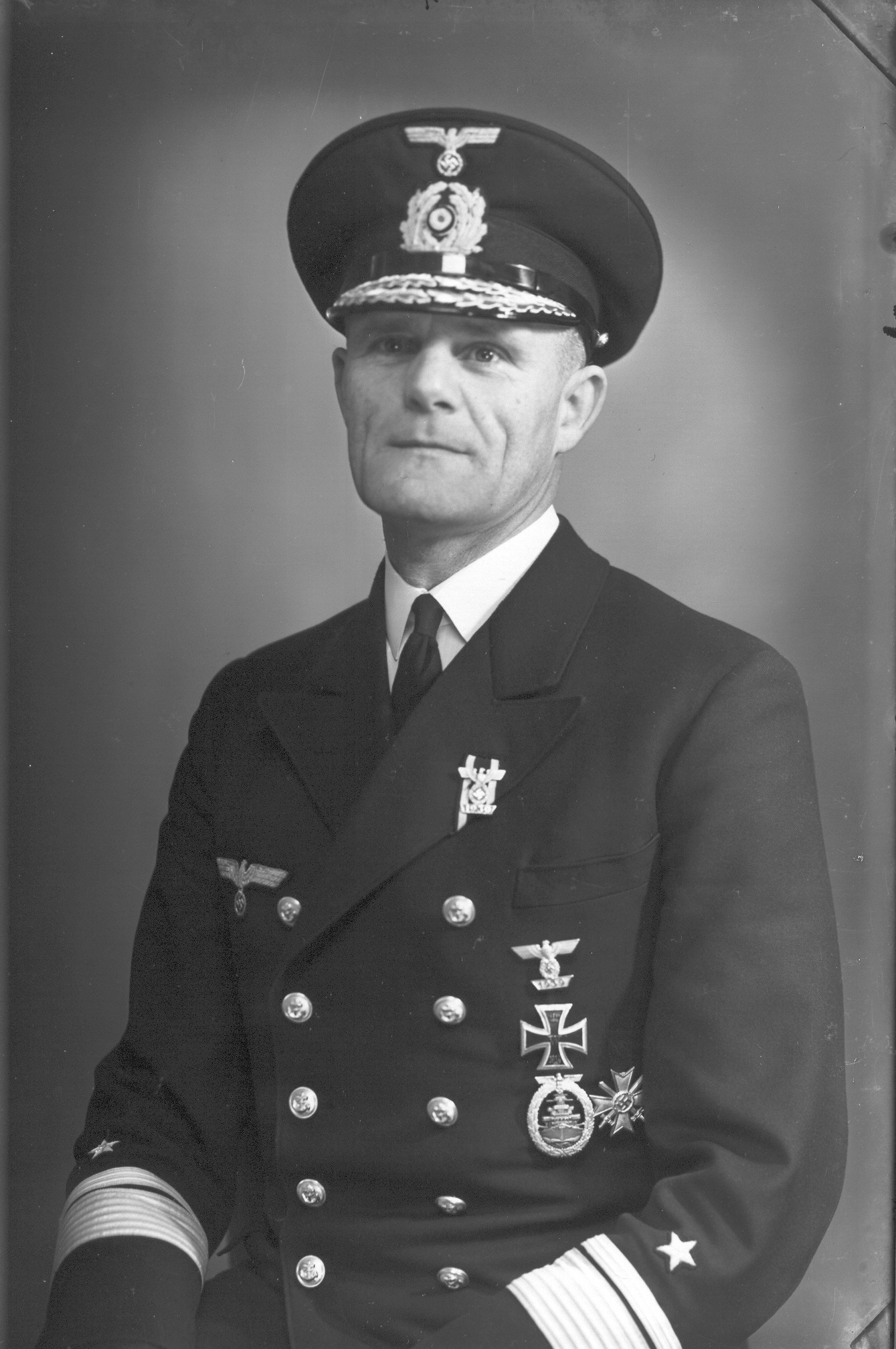 Porträtfotografie von Konteradmiral Heinrich Ruhfus